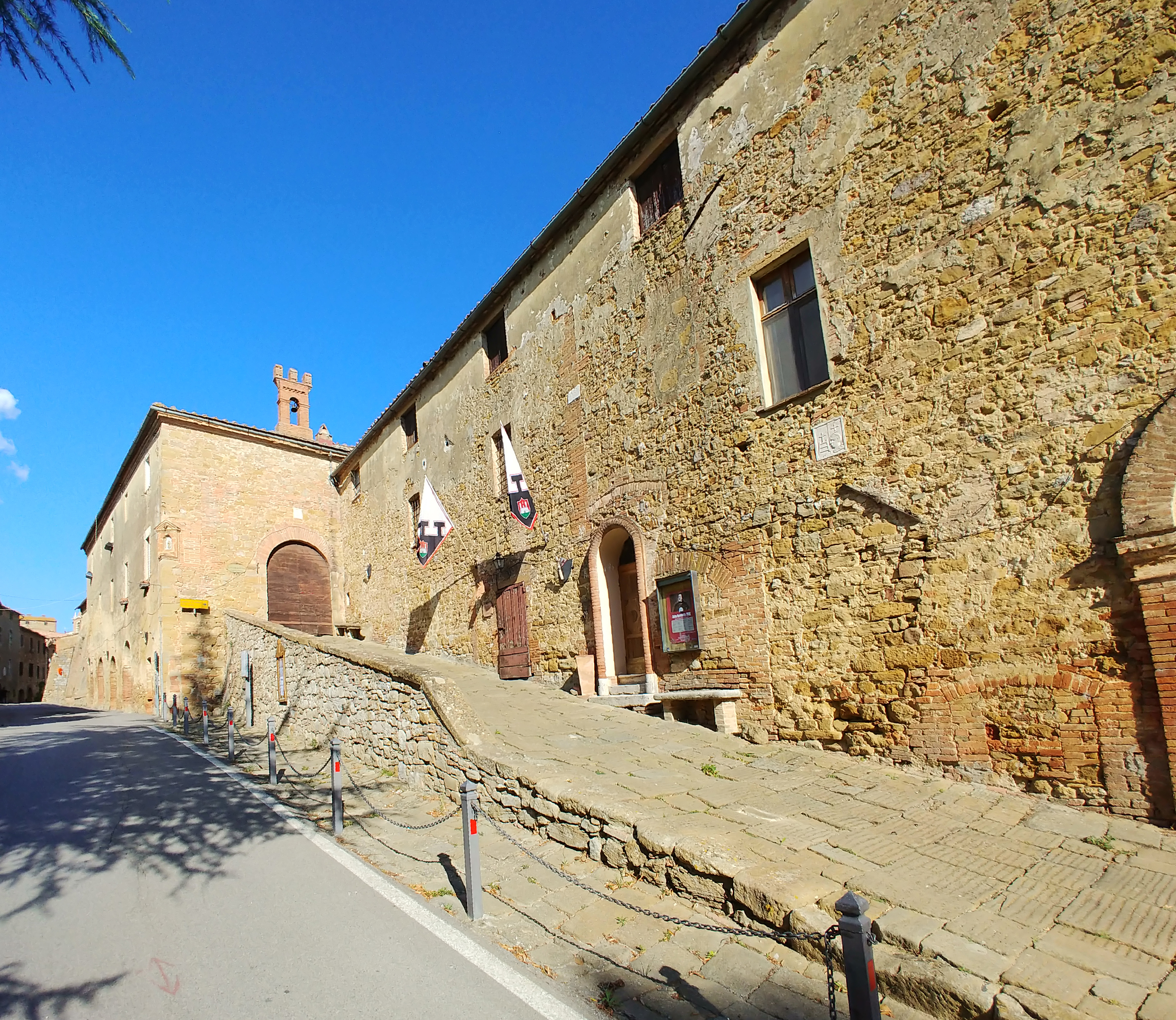 Esterno.